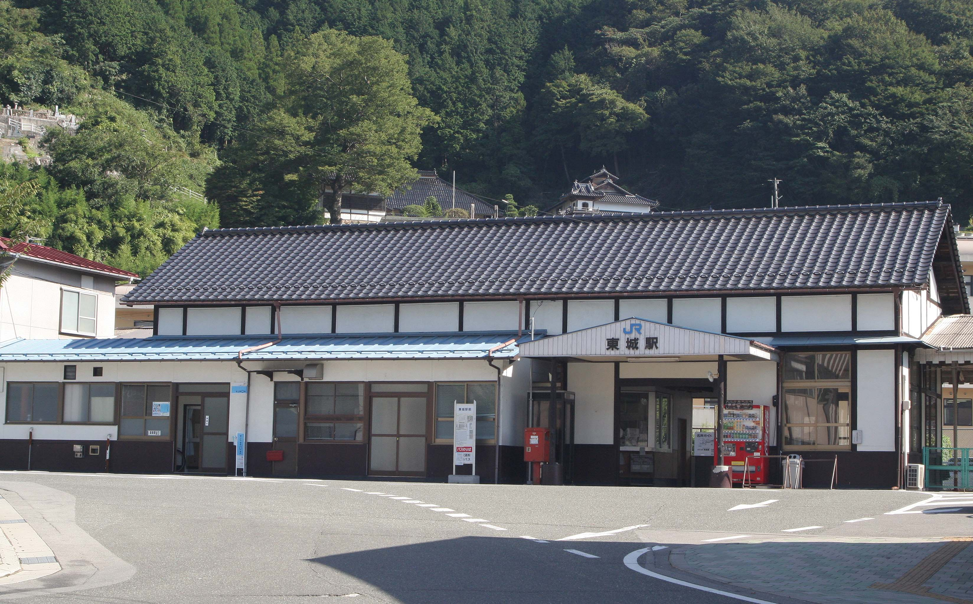 西日本旅客鉄道 東城駅の駅舎